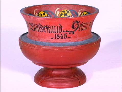 Ølbolle fra Eid i Sogn og Fjordanne, nå på Norsk Folkemuseum i Oslo. Diameter 26 cm. NF.1916-0295